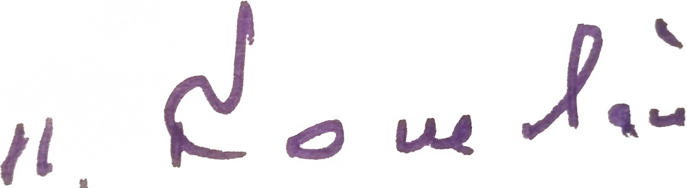 Роспись командующего войсками Киевского военного округа генерал-полковника Петра Кошевого (1904–1976)